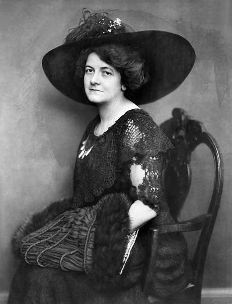 Die Schriftstellerin Marie Luise Becker 1911 in einem Kleid mit Spitzenüberwurf, großem Hut und Muff. Photographie von Becker & Maass, Berlin, 1911